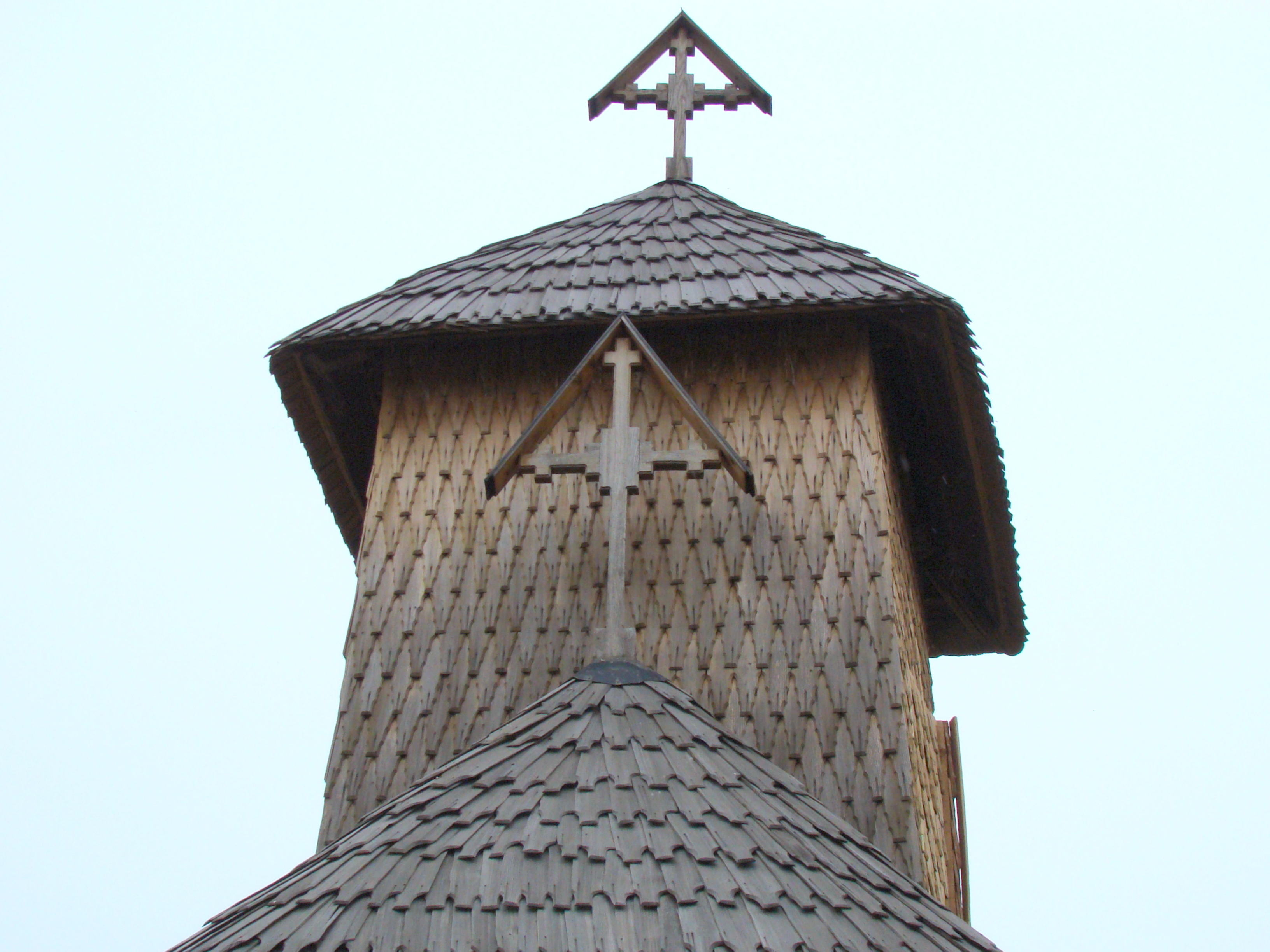 Biserica de lemn „Cuvioasa Paraschiva” din Peștișani, județul Gorj